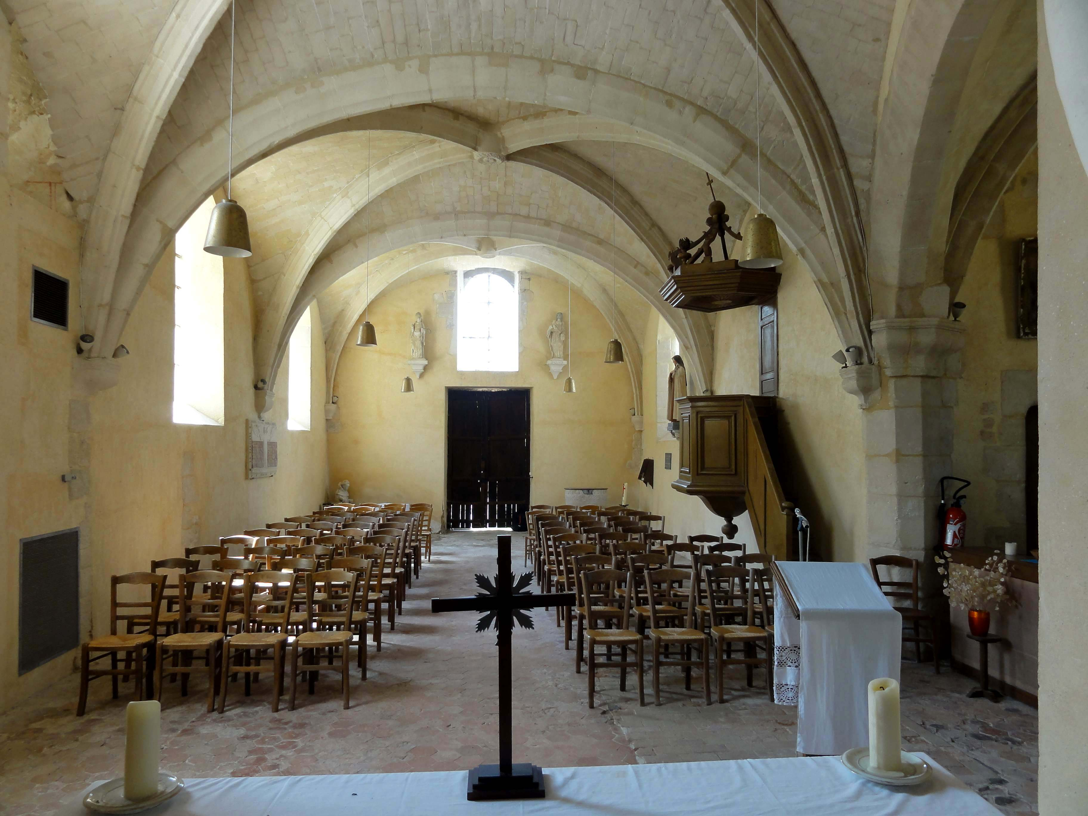 Intérieur de l'église (voir titre).